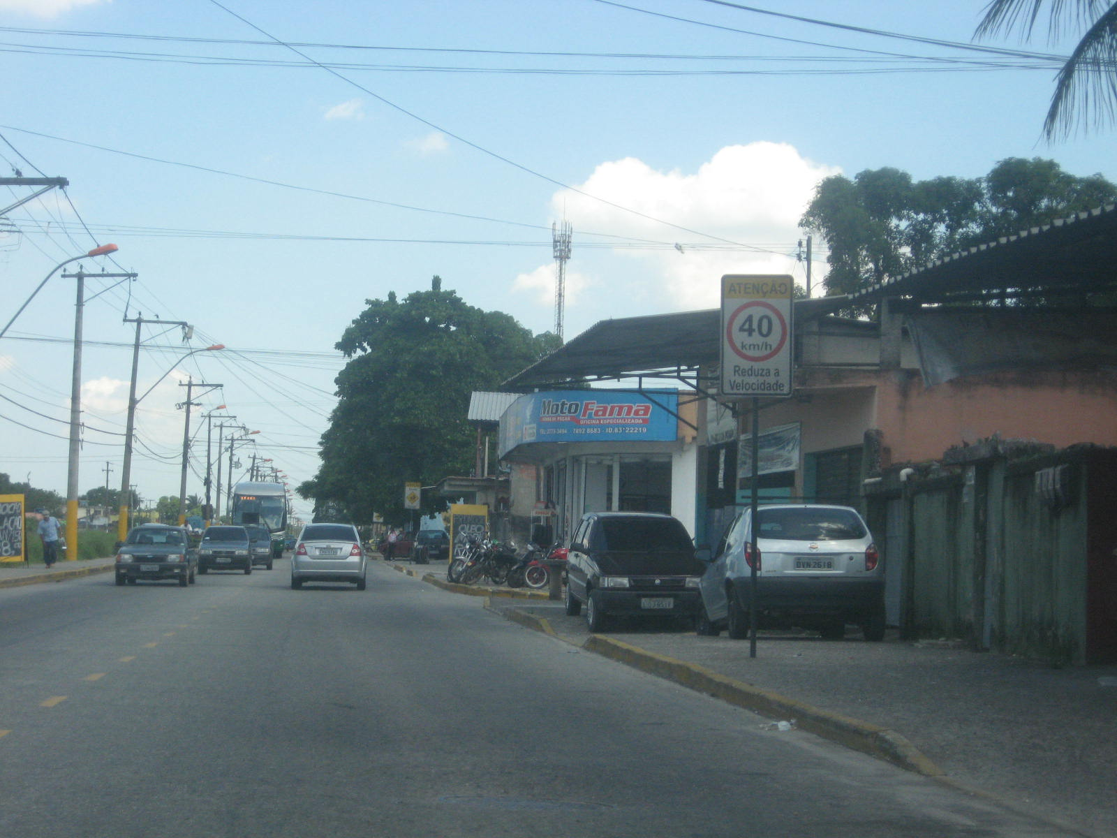 Vista do bairro de Parada Angélica, em Duque de Caxias.